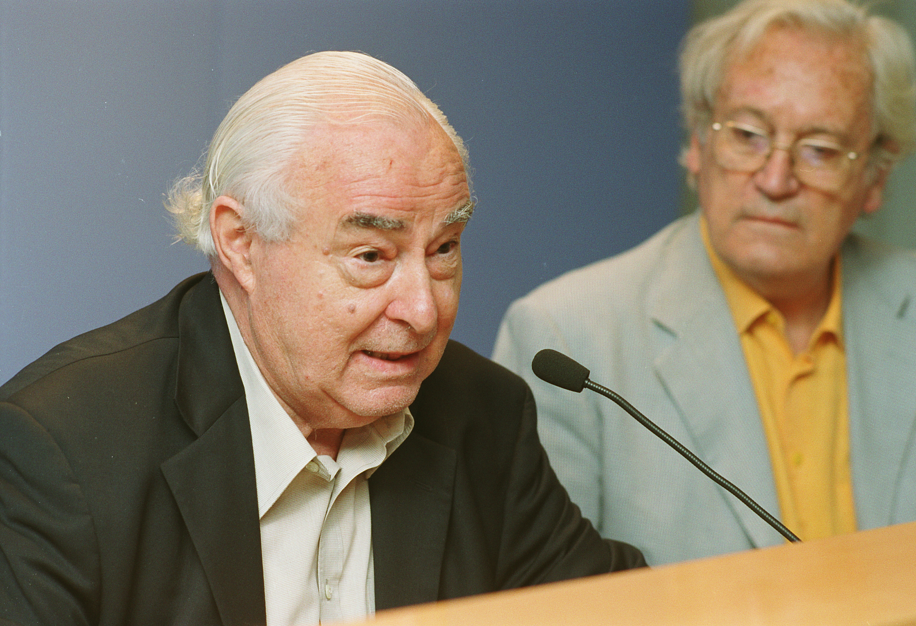 Arnau Puig al MHC el 2001, amb Oriol Bohigas al fons.